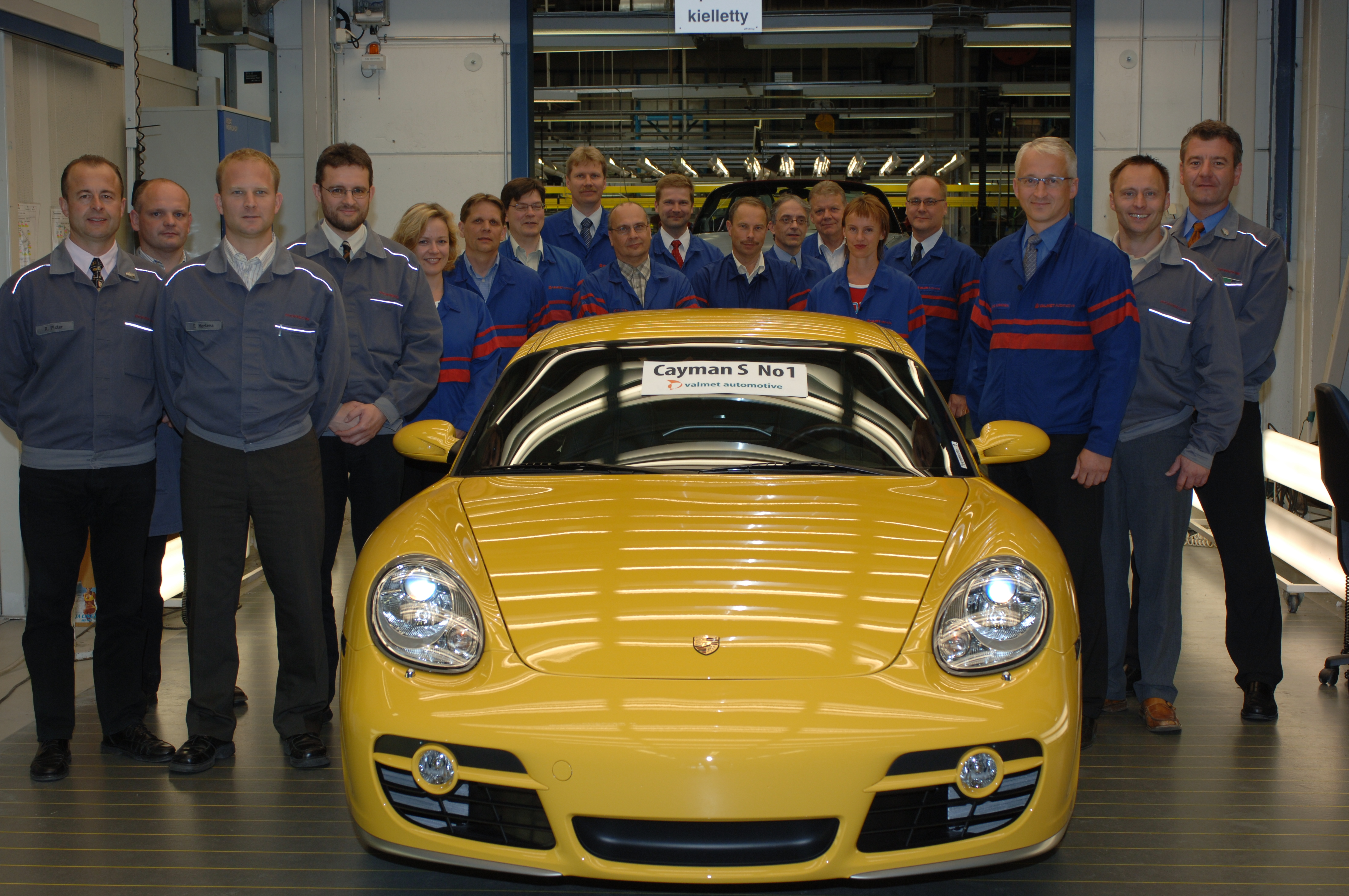 Erster Cayman aus Finnland